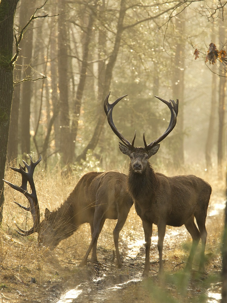 Edelherten in tegenlicht